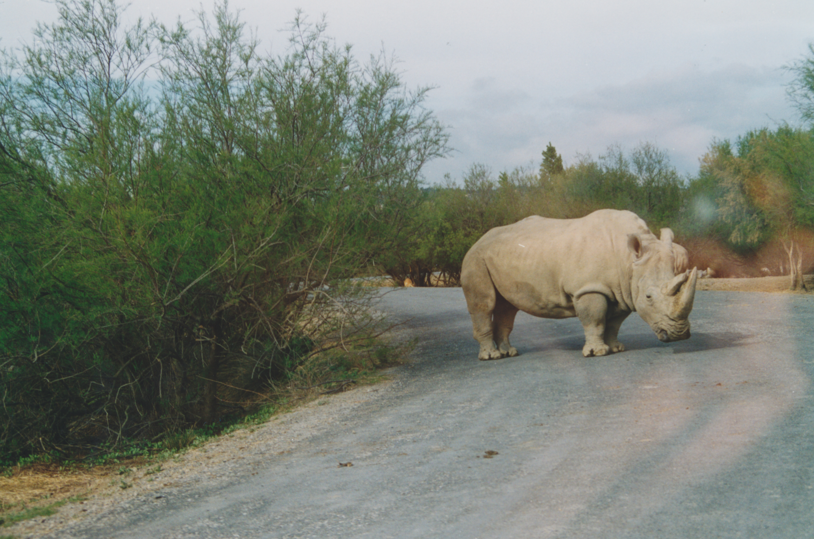 Réserve africaine de Sigean : Ein Nashorn mitten auf der PKW-Fahrbahn Datum: 04.2002 Urheber: Michael Pfeiffer alias User:Gordito1869 Quelle: privates Fotoarchiv des Urhebers